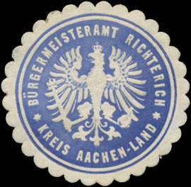 Sealing stamp Title: Bürgermeisteramt Richterich Kreis Aachen-Land Description: blau, weiß, geprägt Place: Richterich size: 4 cm